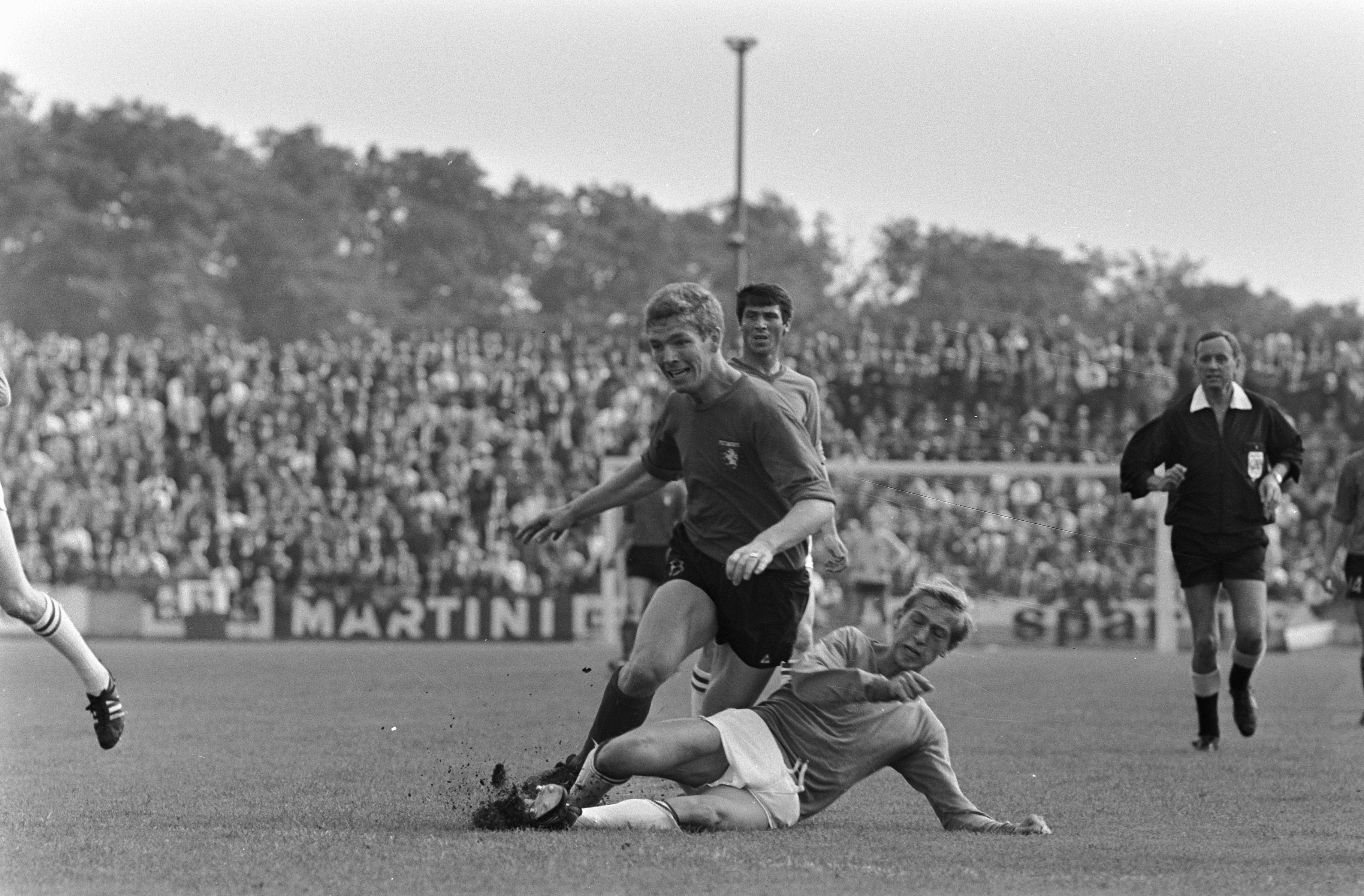 Collectie / Archief : Fotocollectie Anefo Reportage / Serie : Twente-ADO Beschrijving : Houwaart (links) en Weimar (liggend) in duel Annotatie : randnummer negatiefstrook nr 1 - Achterberg; nr 3 - Achterberg (rechts) en Dick Advocaat Datum : 8 september 1968 Locatie : Enschede, Overijssel Trefwoorden : voetbal Fotograaf : Fotograaf Onbekend / Anefo Auteursrechthebbende : Nationaal Archief Materiaalsoort : Negatief (zwart/wit) Nummer archiefinventaris : bekijk toegang 2.24.01.05 Bestanddeelnummer : 921-6684